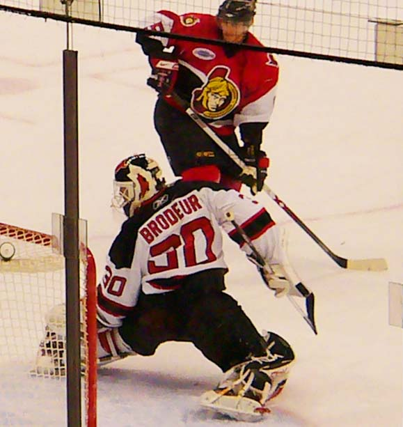 5 Christoph Schubert beats #30 MArtin Brodeur